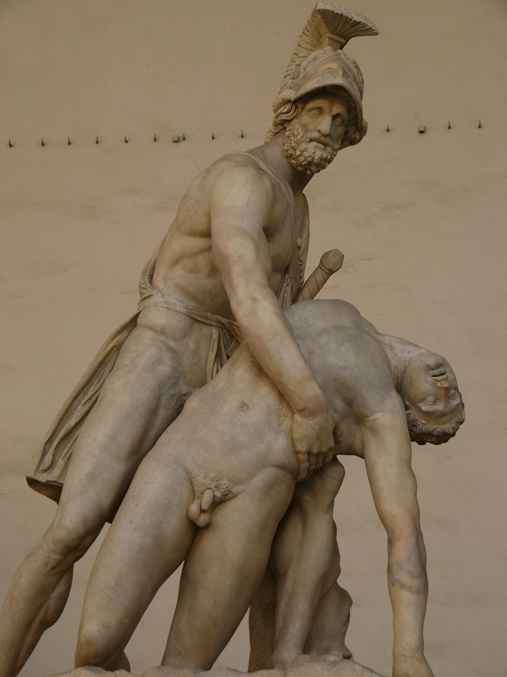 Beeld in Loggia dei Lanzi in Florence